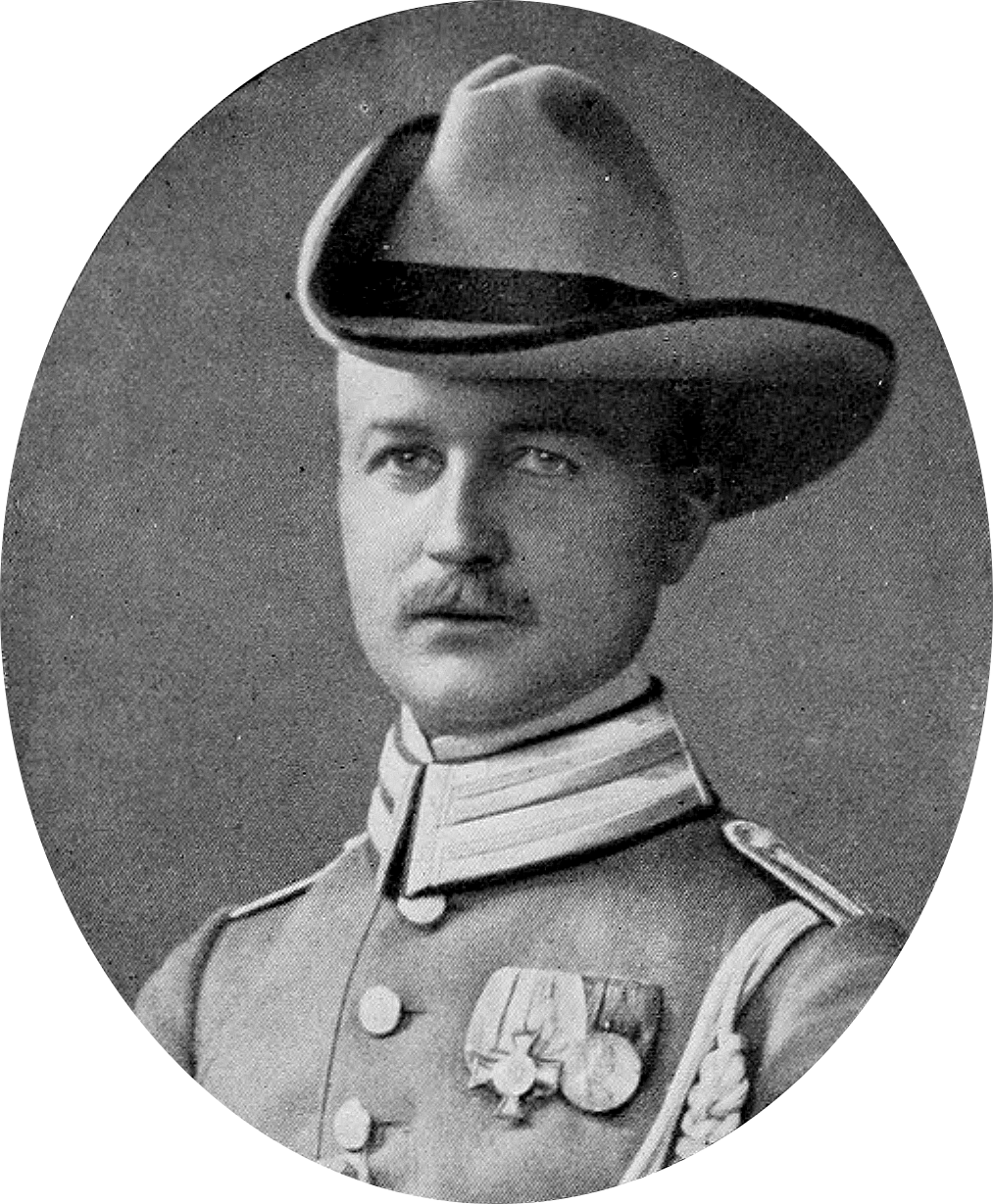 Arnold Schultze (vor 1910)